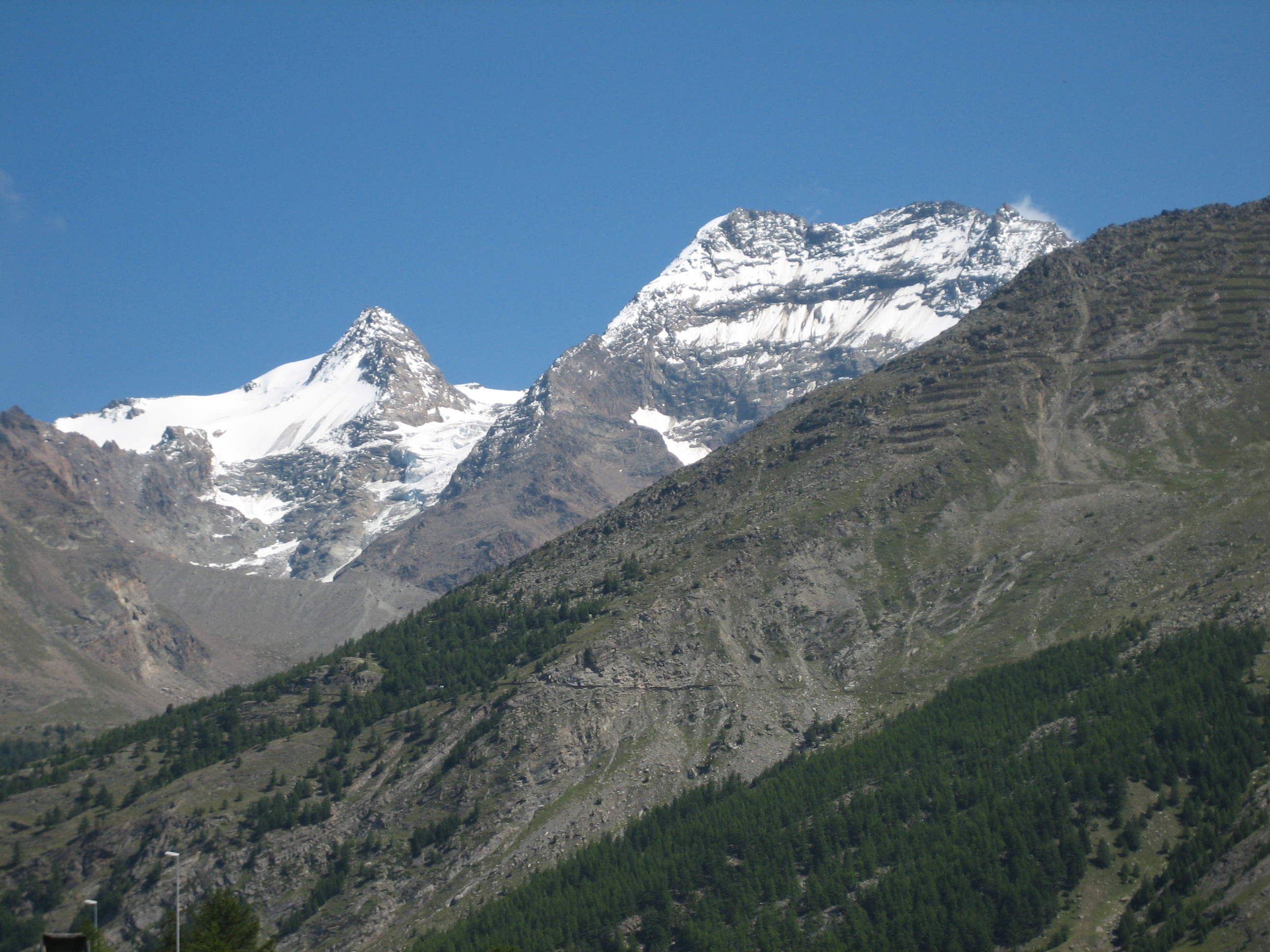 Fletschhorn & Lagginhorn from Saas-Fee